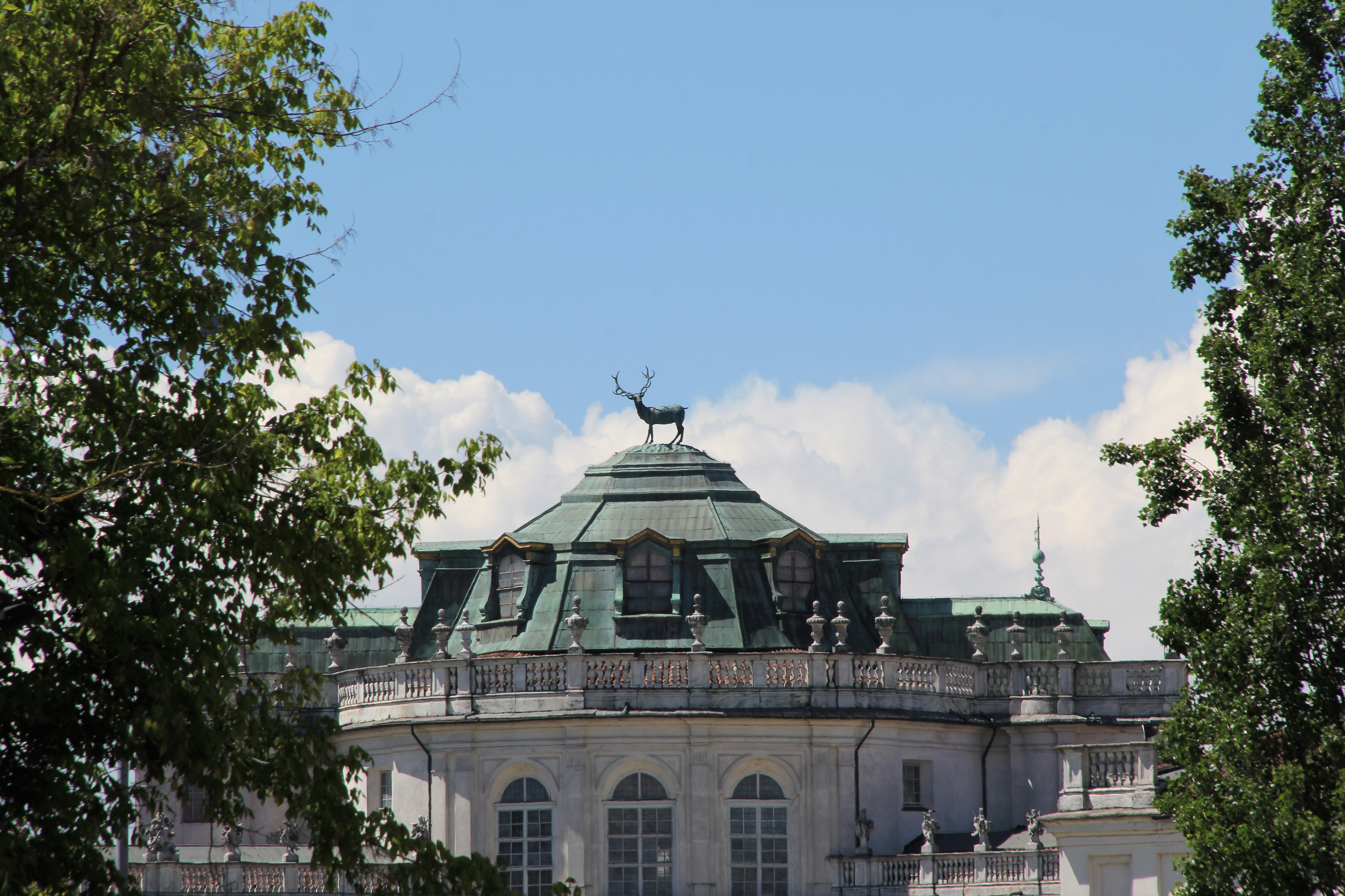 Nichelino, palazzina di caccia di Stupinigi